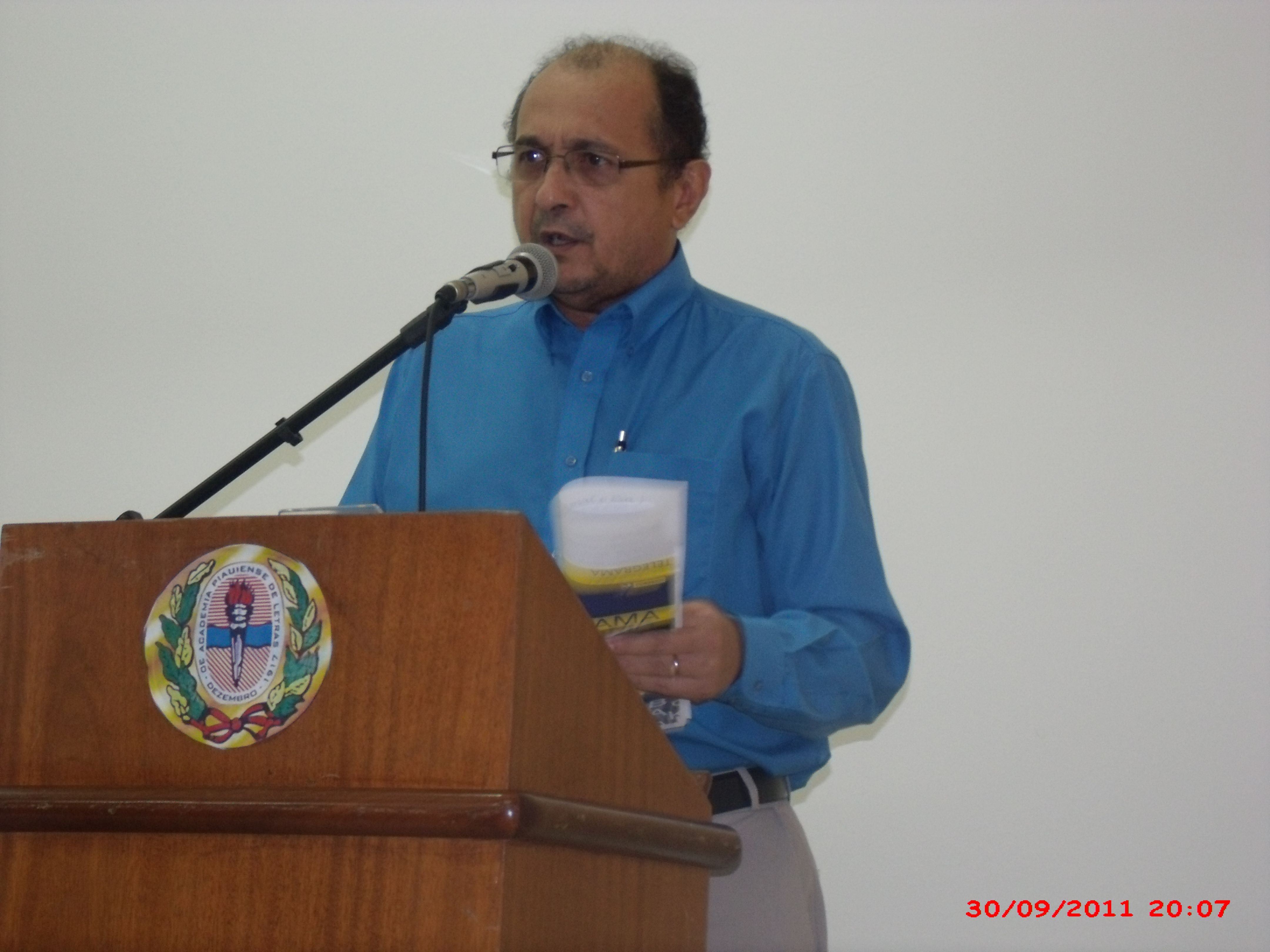 Escritor Piauiense Elmar Carvalho na tribuna da Academia Piauiense de Letras em 2011.